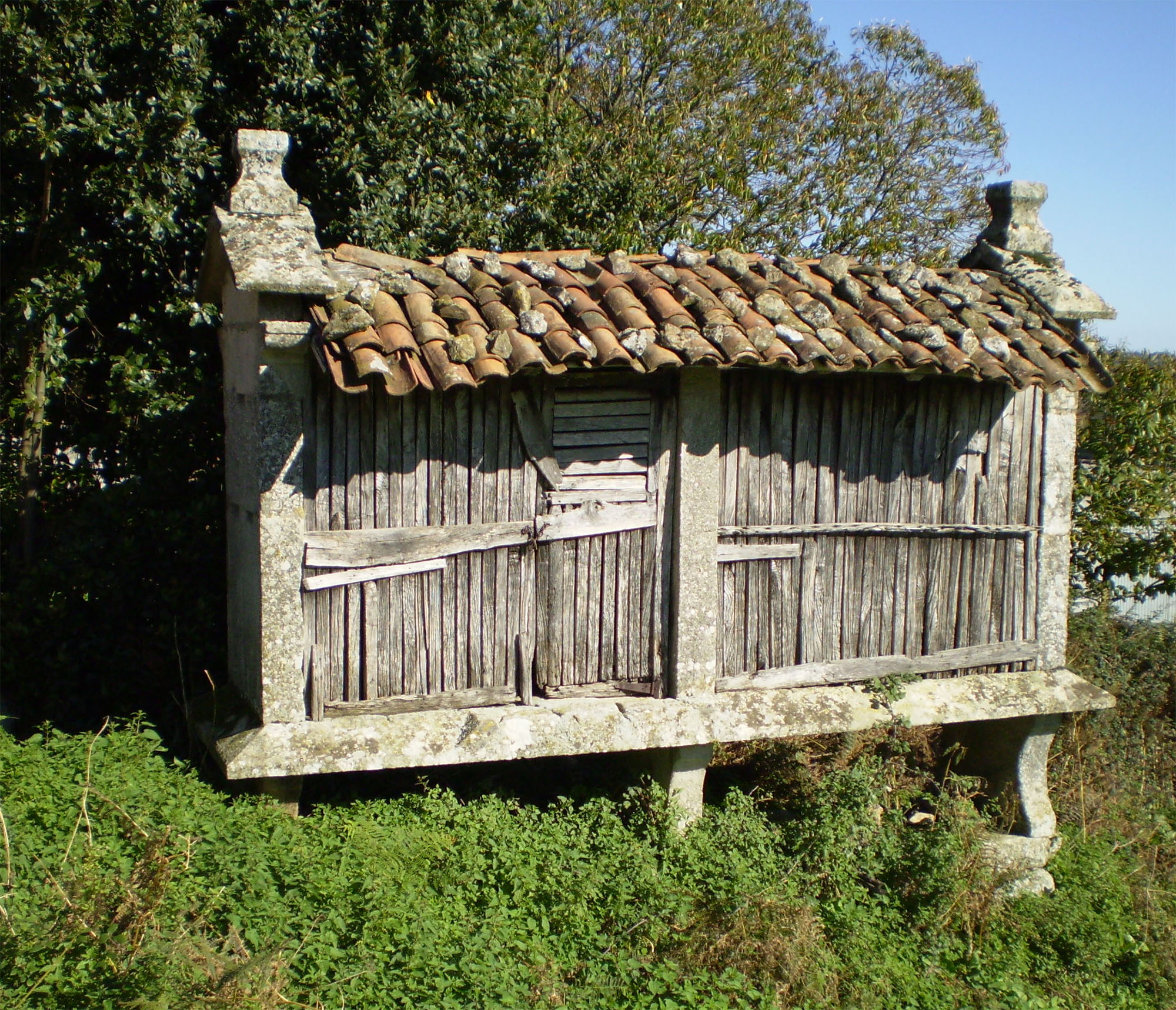 Hórreo de tipo mahía, sobre cepas de canteiría e con cuberta de talla do país. Probable porta penal. O desleixo e estado de abandono destas fermosísimas construcións, donas da aira doutrora, son produto da reiterada despoboación rural, así como un rotundo cambio no sistema produtivo do noso agro. Así pódese observar o que outrora estaría no espazo máis predominante, hoxe esmorece entre as silvas e nin tan siquera se repoñen os adornos que tantas horas de canteiro supuxeron no seu día... Ubícase esta, a pesares de todo, fermosa peza, no lugar do Rial (Antas de Ulla)